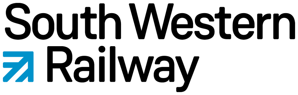 C'est le logo de la nouvelle compagnie ferroviaire que exploite la franchise South Western